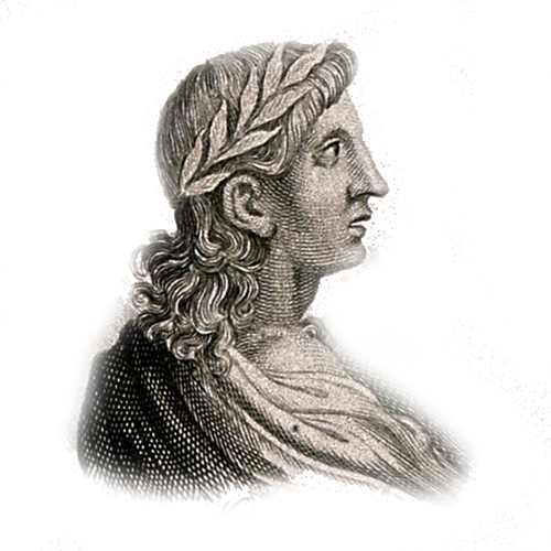 Вергілій.